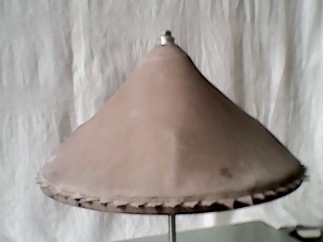 Модель ВЛА, созданная автором для подтверждения возможности динамической компенсации давления атмосферы на оболочку аппарата